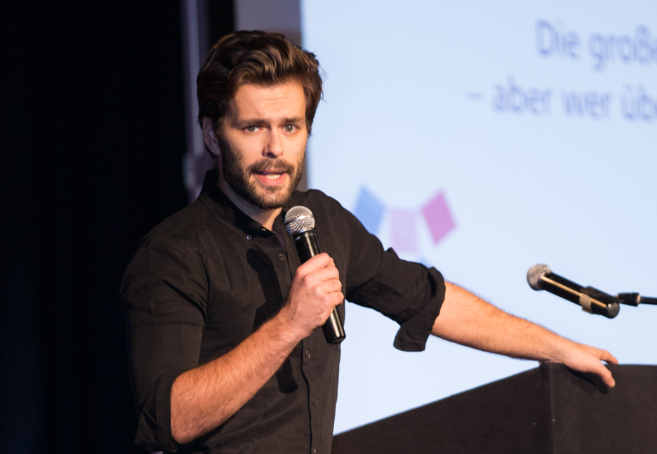 Tilo Jung (Jung & Naiv) moderiert auf den Jugendmedientagen 2015 in Bonn. Foto: Florian Timpe